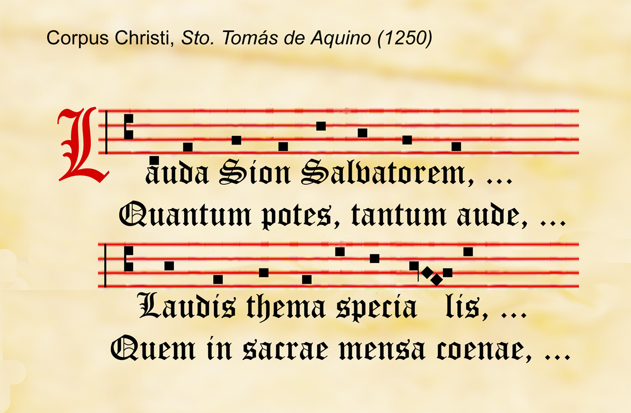 Secuencia: Lauda Sion, del Corpus Christi, Sto. Tomás de Aquino (s XIII). Copia moderna.